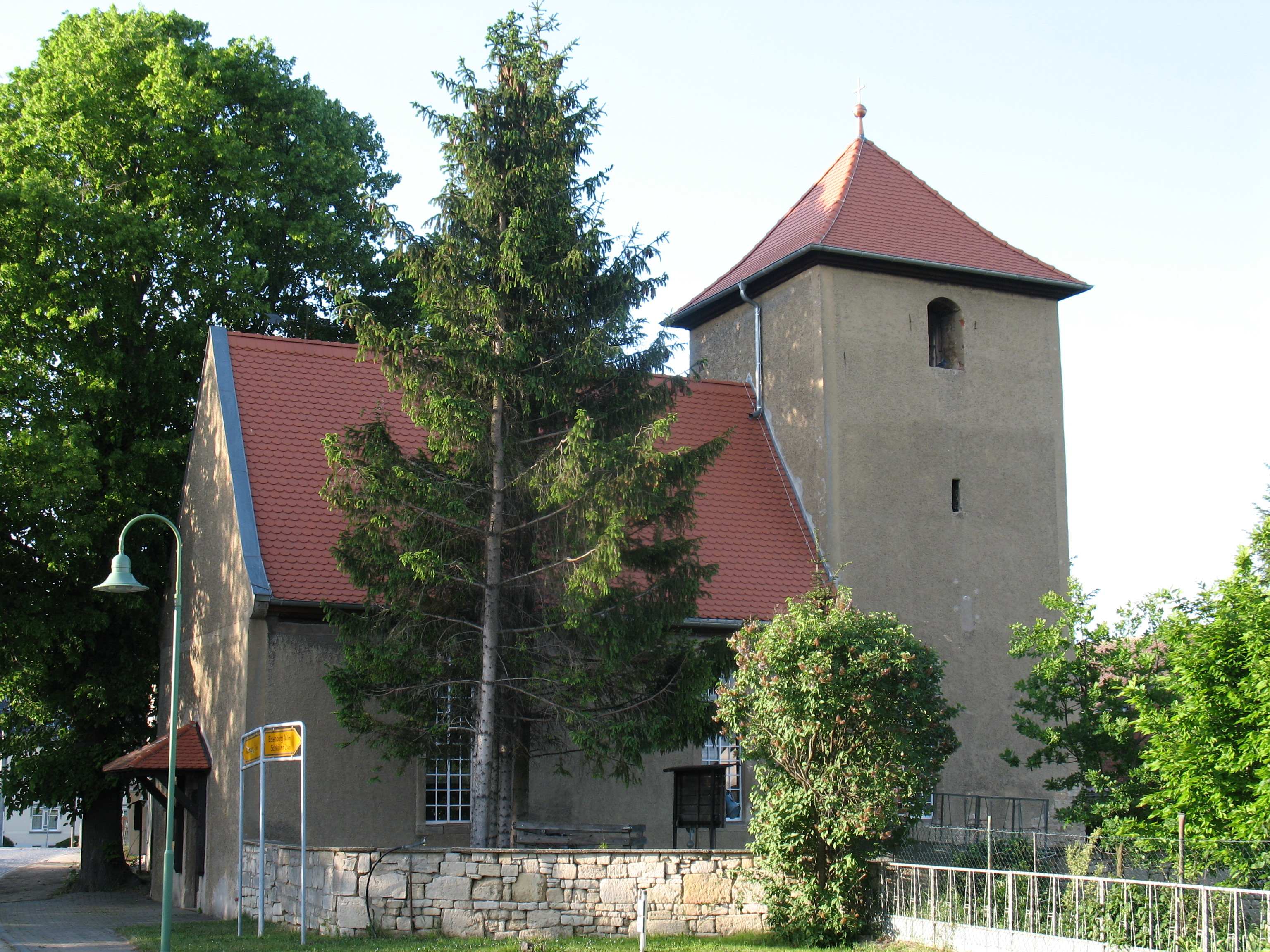 Kirche in Aue, Molauer LandUnknown church in village aue, molauer land, germany